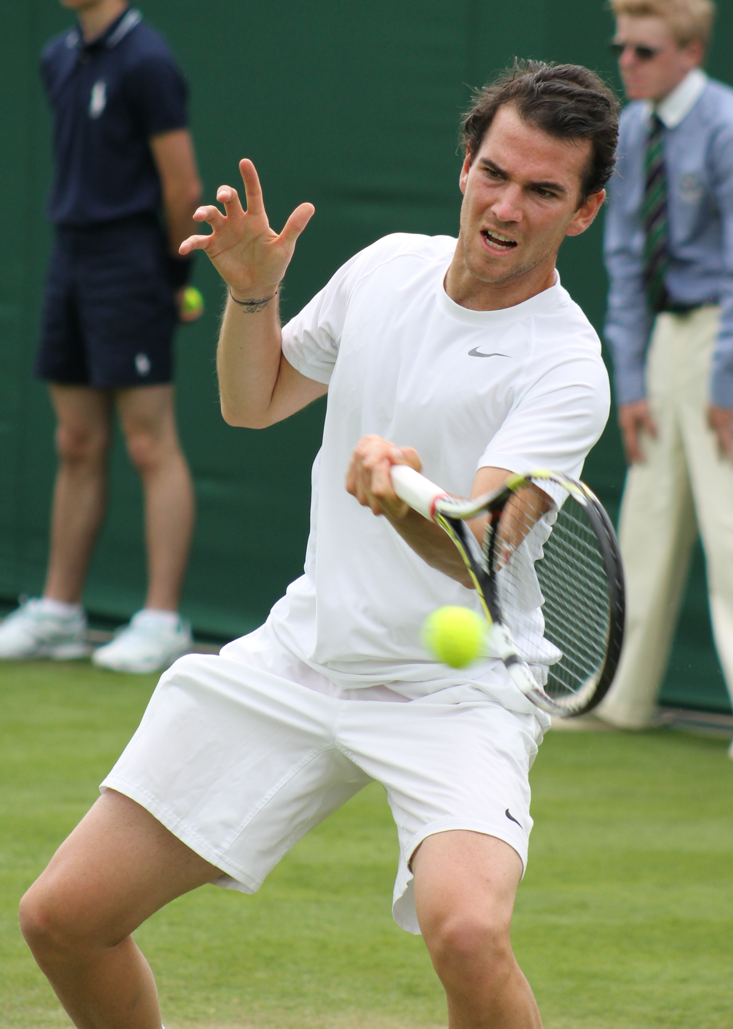 Mannarino WM13-016